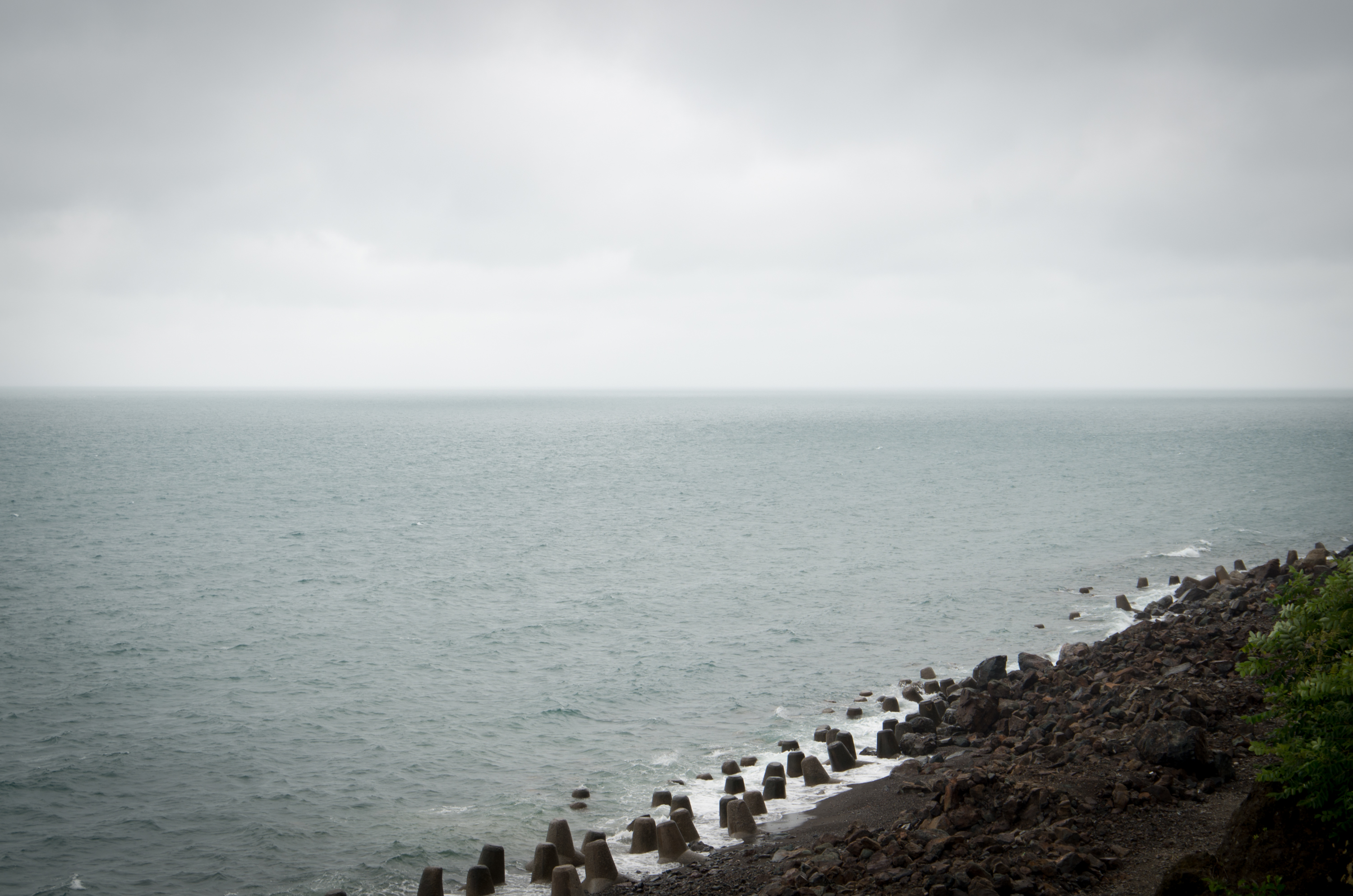 Узбярэжжа Чорнага мора каля Гоніа (Грузія)